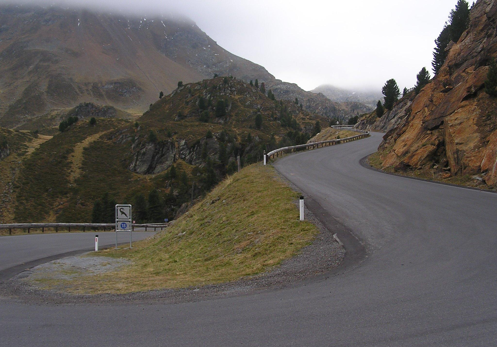 Kaunertaler Gletscherstrasse (südwestliches Tirol) in Höhe der Baumgrenze